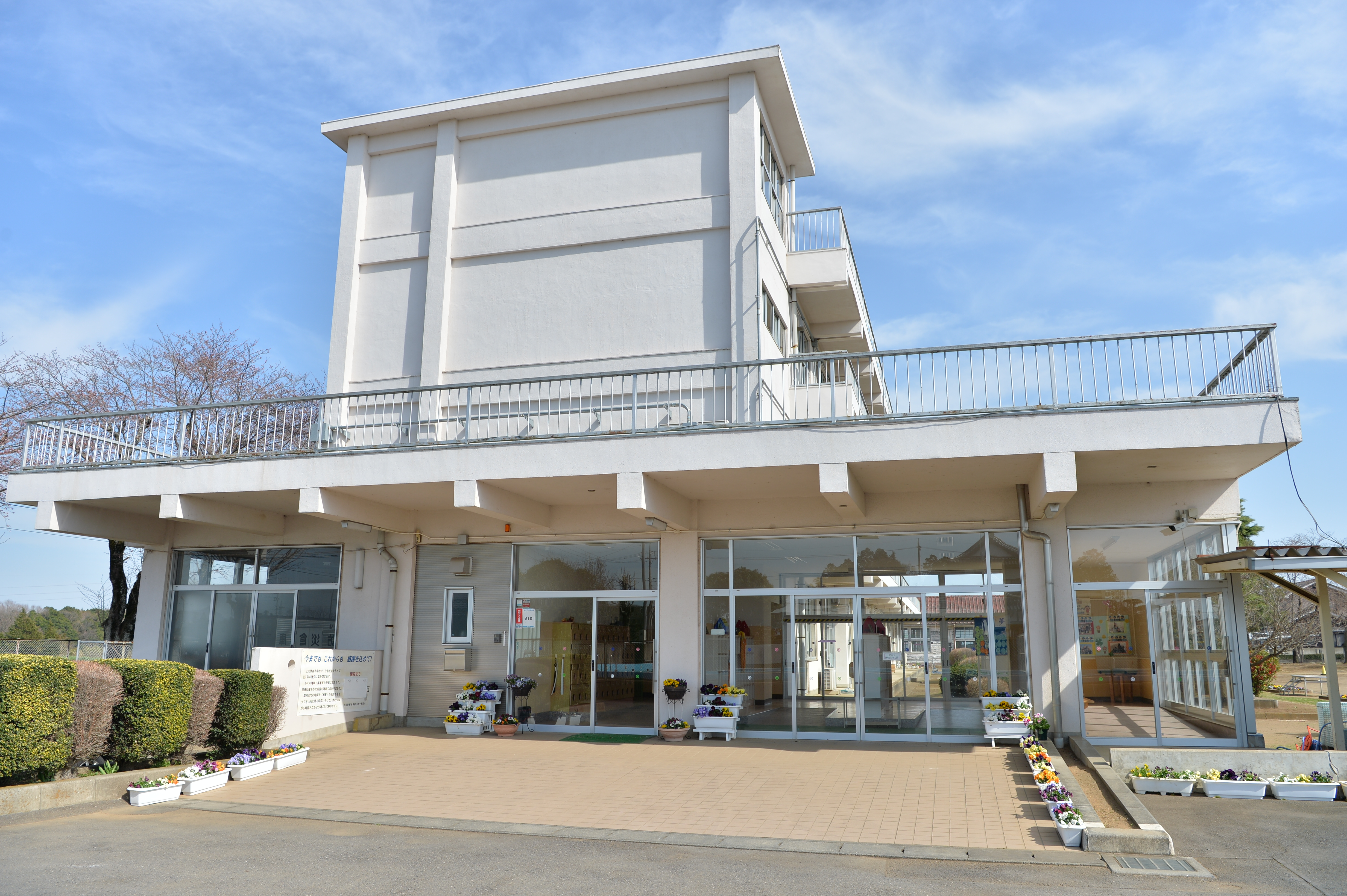 茨城県土浦市手野町にて。土浦市立上大津西小学校の校舎入口（昇降口）。